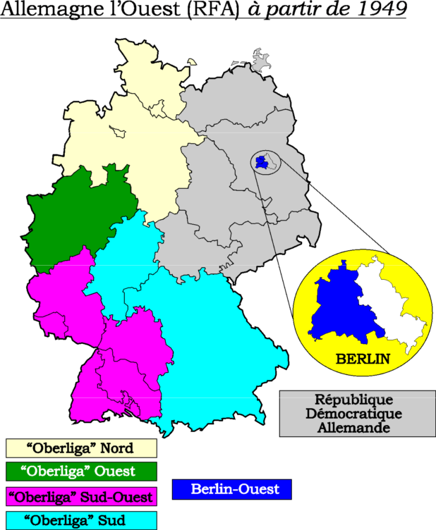 Carte montrant les "Oberligen" (plus hautes divisions du football allemand) en 1949 Catégorie:Football en Allemagne